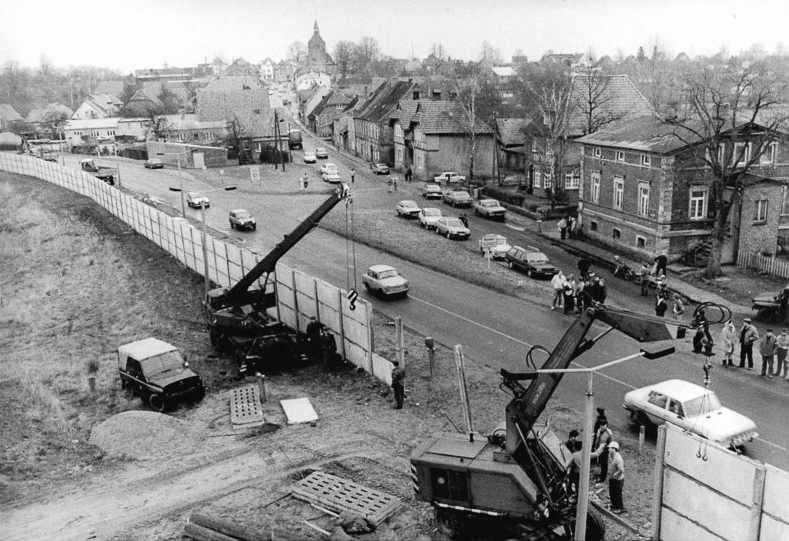 ADN-ZB- Pätzold- 22.1.90 Bez. Rostock: Mauerabriss- Nahe der Ortschaft Dassow (Kreis Grevesmühlen) wurde mit dem Abbau von 3,2 Kilometern der Grenzmauer begonnen. Betriebe des Territoriums unterstützen die mehrwöchigen Arbeiten. Die Betonelemente stehen der Gemeinde Selmsdorf und der Stadt Dassow zur Verfügung.